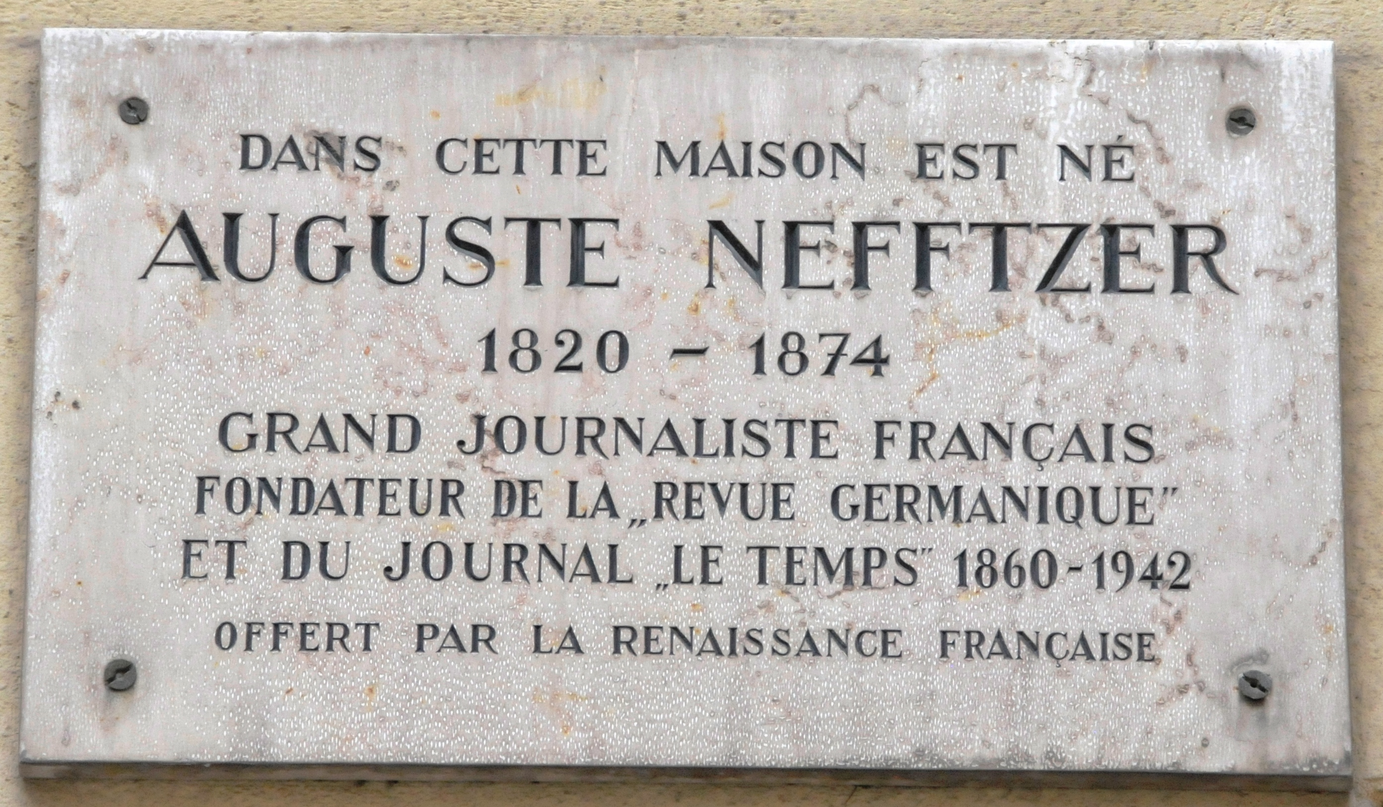 Infotafel am Haus von Auguste Nefftzer in Colmar, Rue des Marchands 44